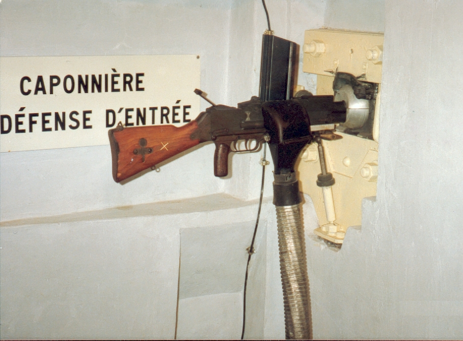 leichtes Maschinengewehr, Kasematte Marckolsheim-Süd, Maginot-Linie